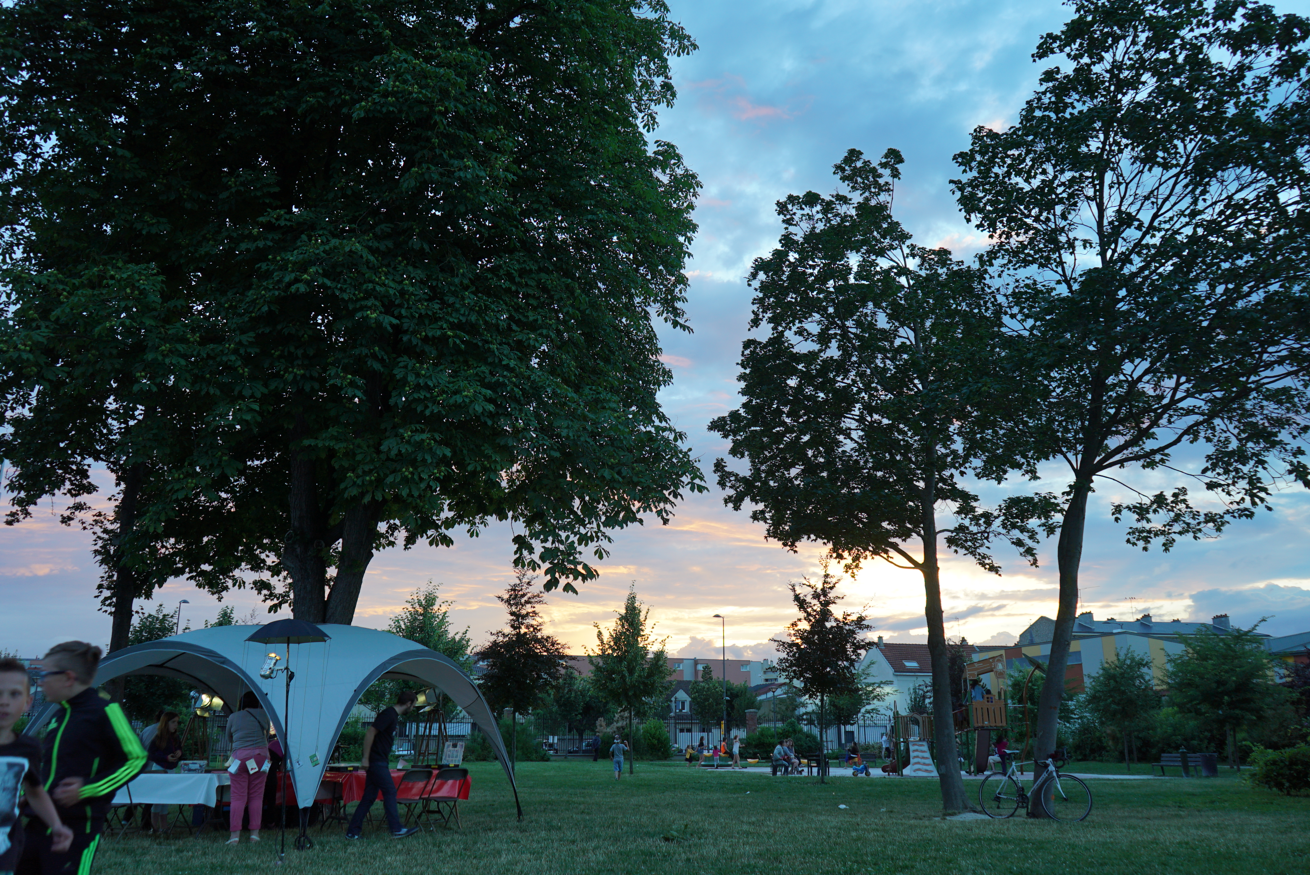 Place_au_cinéma_dans le parc_Bernard stasi.